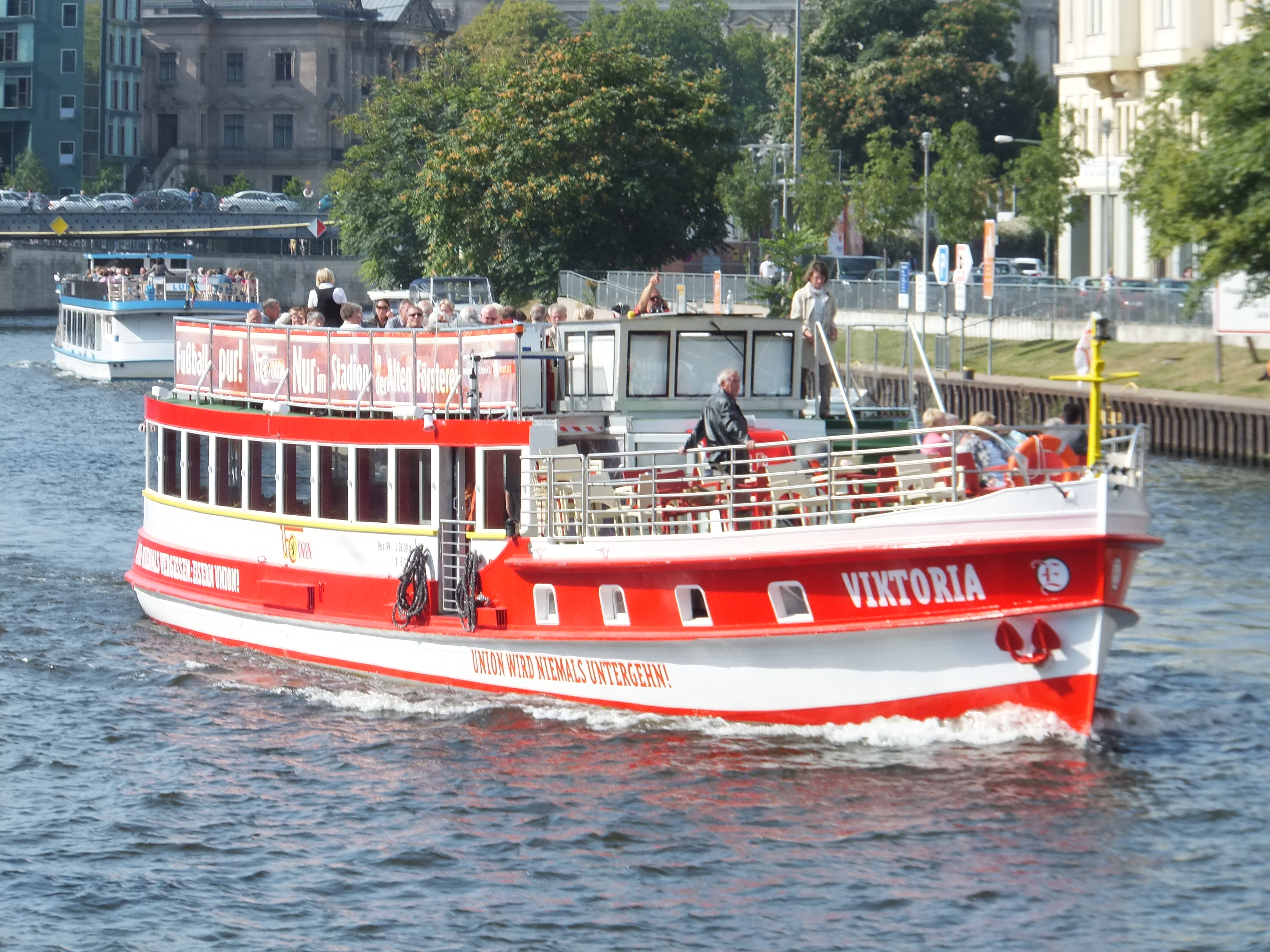 Fahrgastschiffe in Berlin: Viktoria